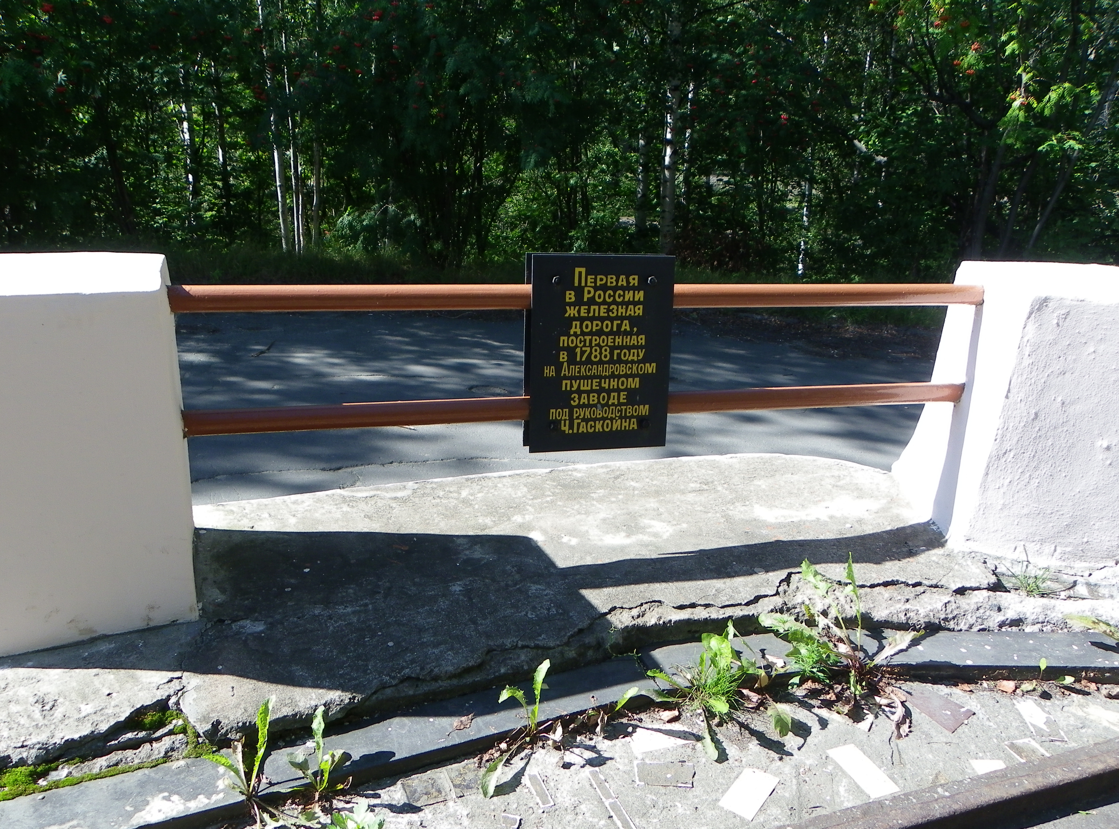 Фрагмент чугунного колесопровода в Петрозаводске